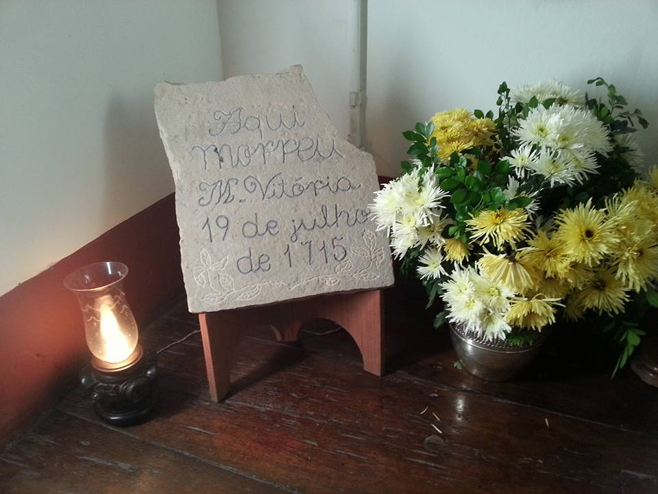 Local onde morreu Madre Vitória